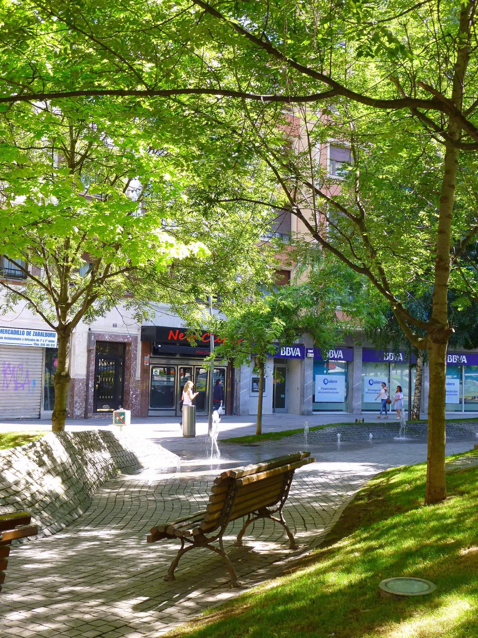 Plaza de Zabalburu (Bilbao)